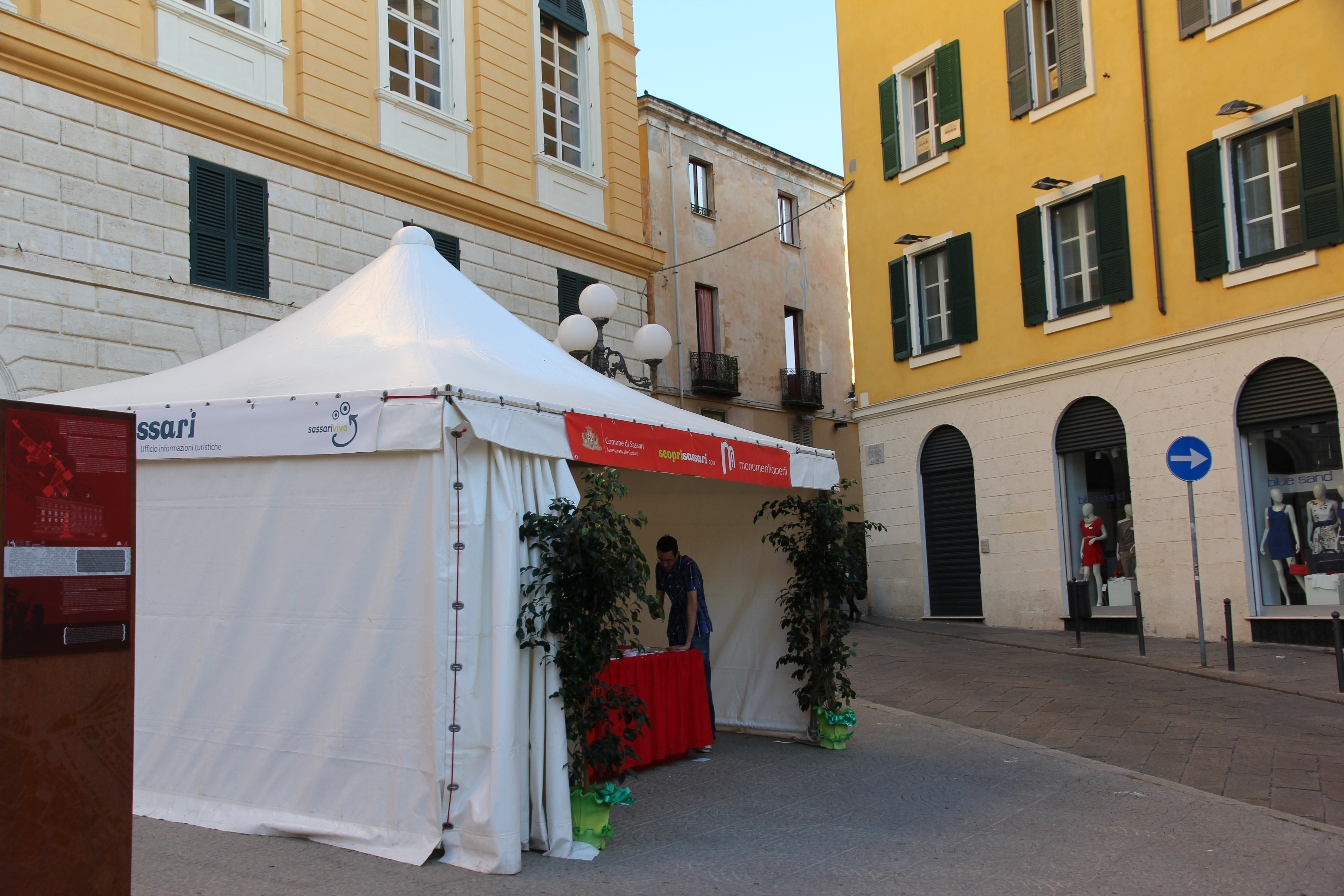 Sassari - Stand Monumenti aperti 2015 (01)